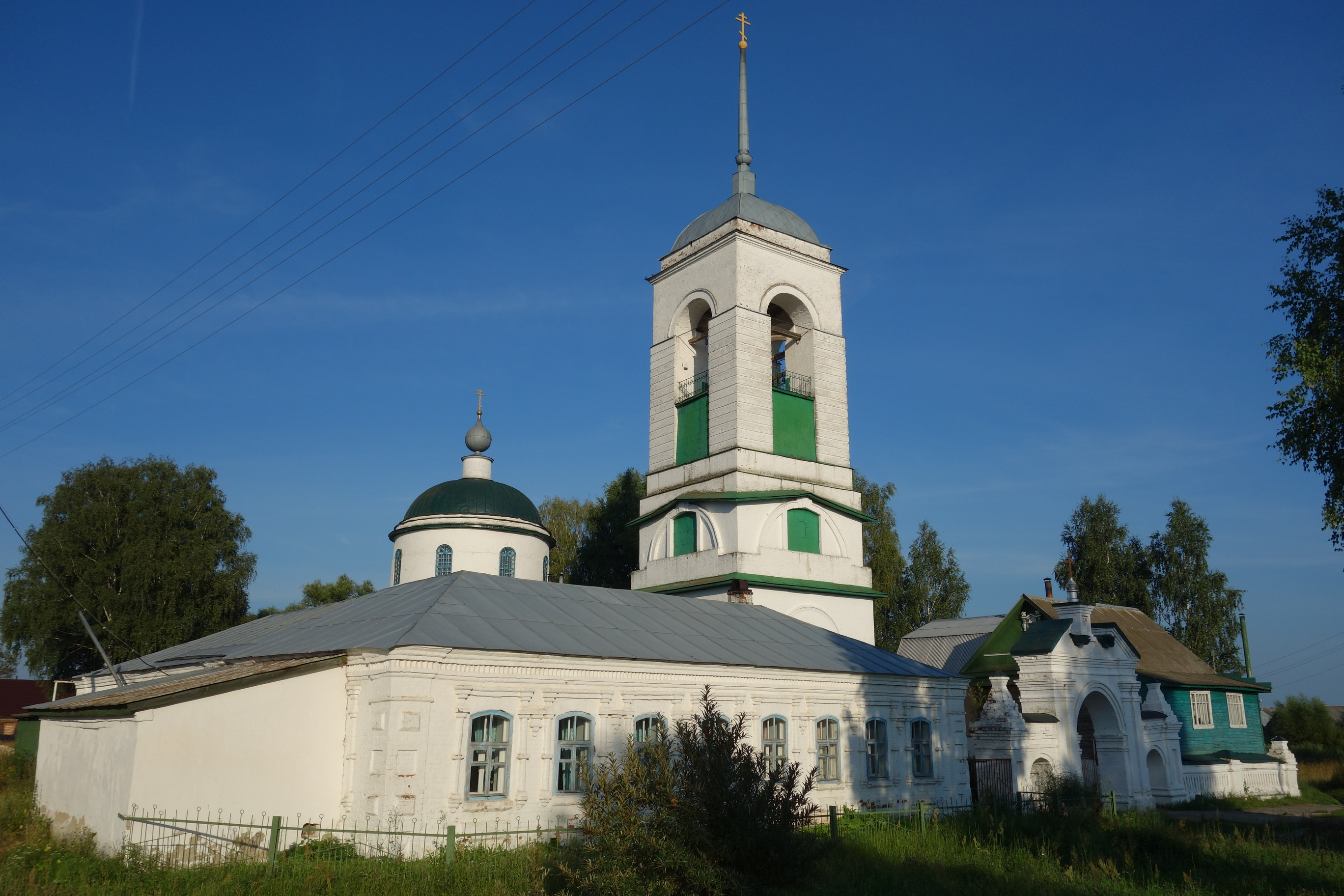 Церковь Рождества Христова: Заколпье, Гусь-Хрустальный район, Владимирская область